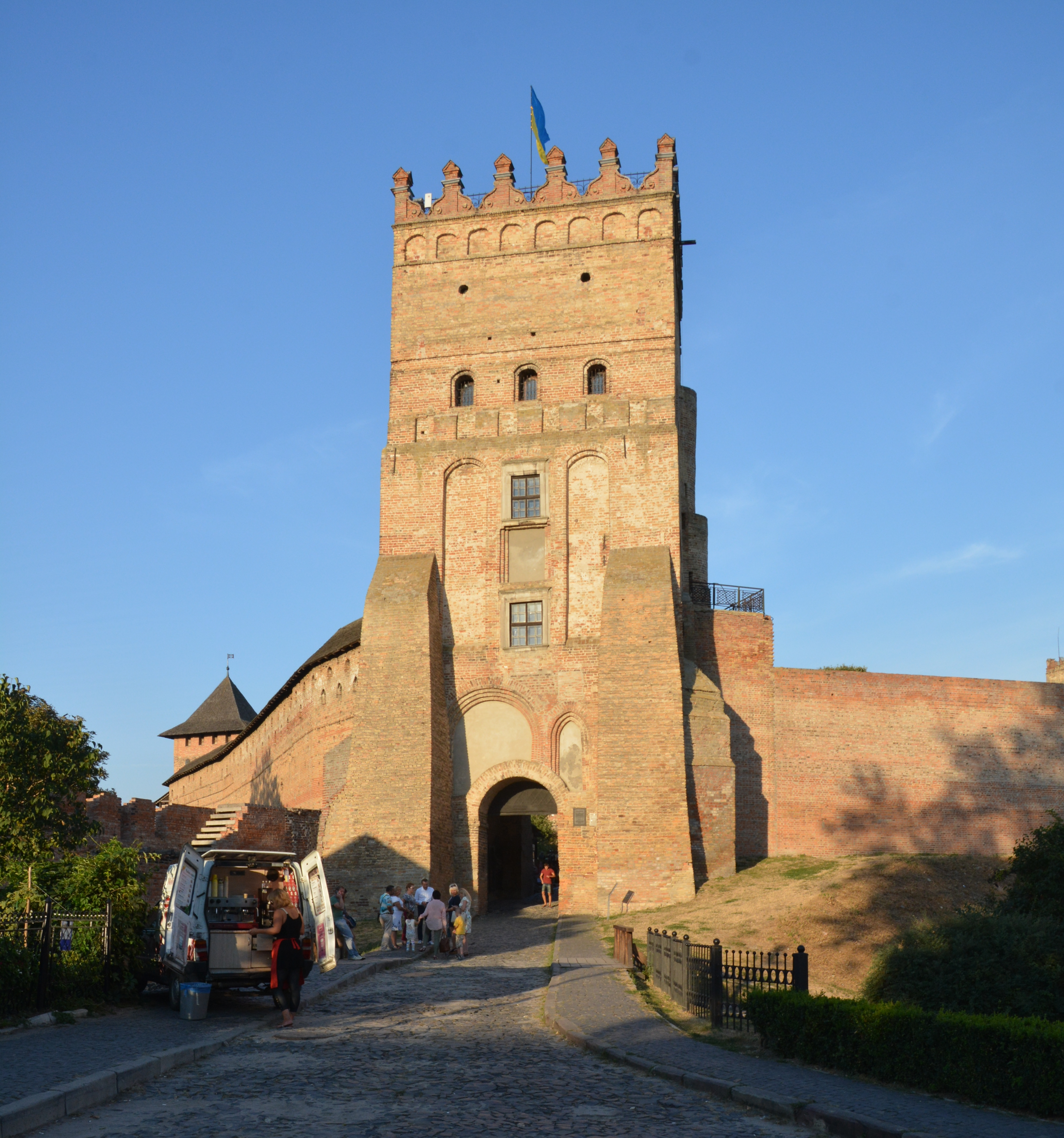 В'їзна (Надбрамна) башта (мур.), Луцьк, вул. Кафедральна, 1а